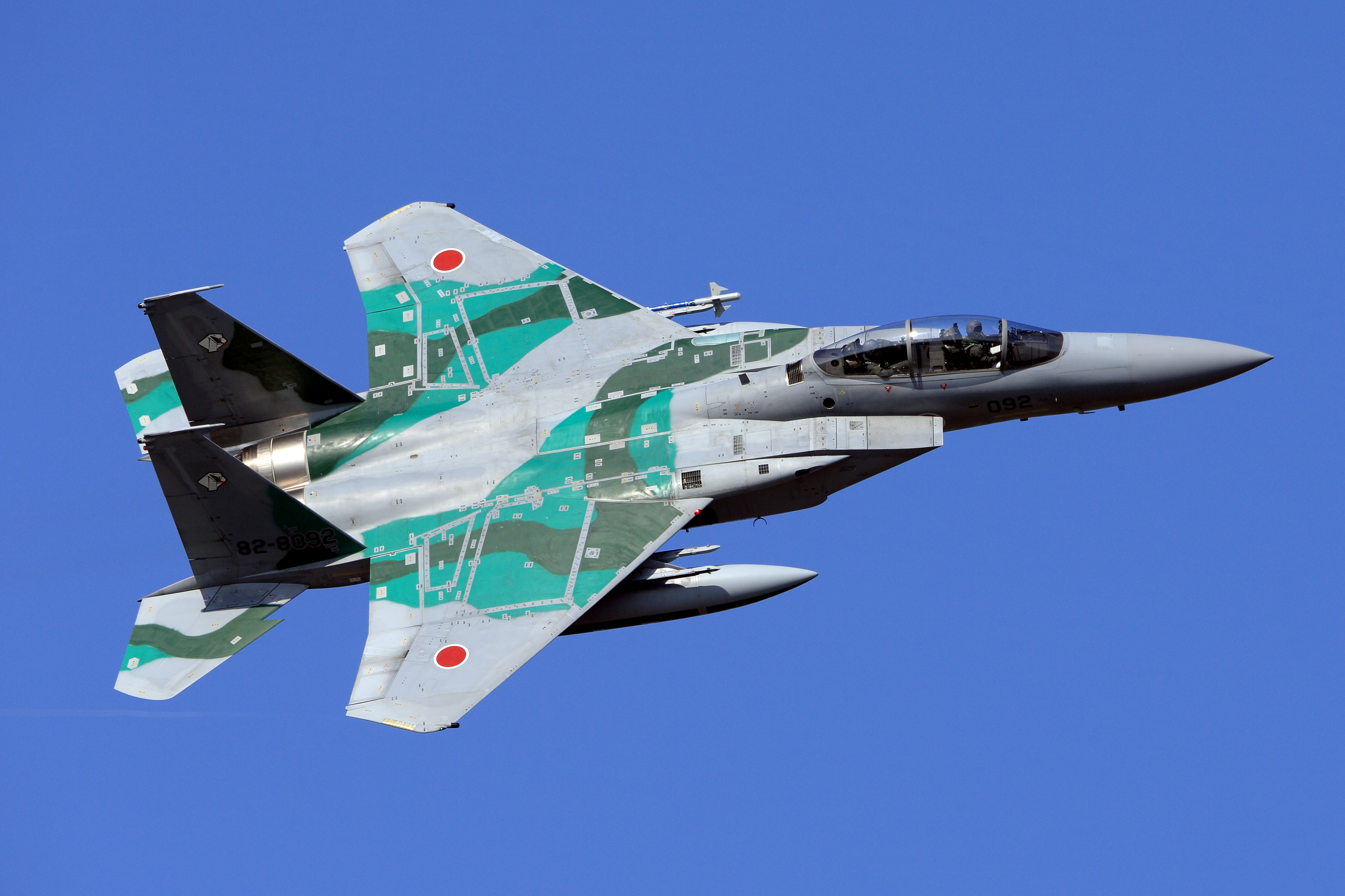 航空自衛隊百里基地で撮影された飛行教導群のF-15DJ